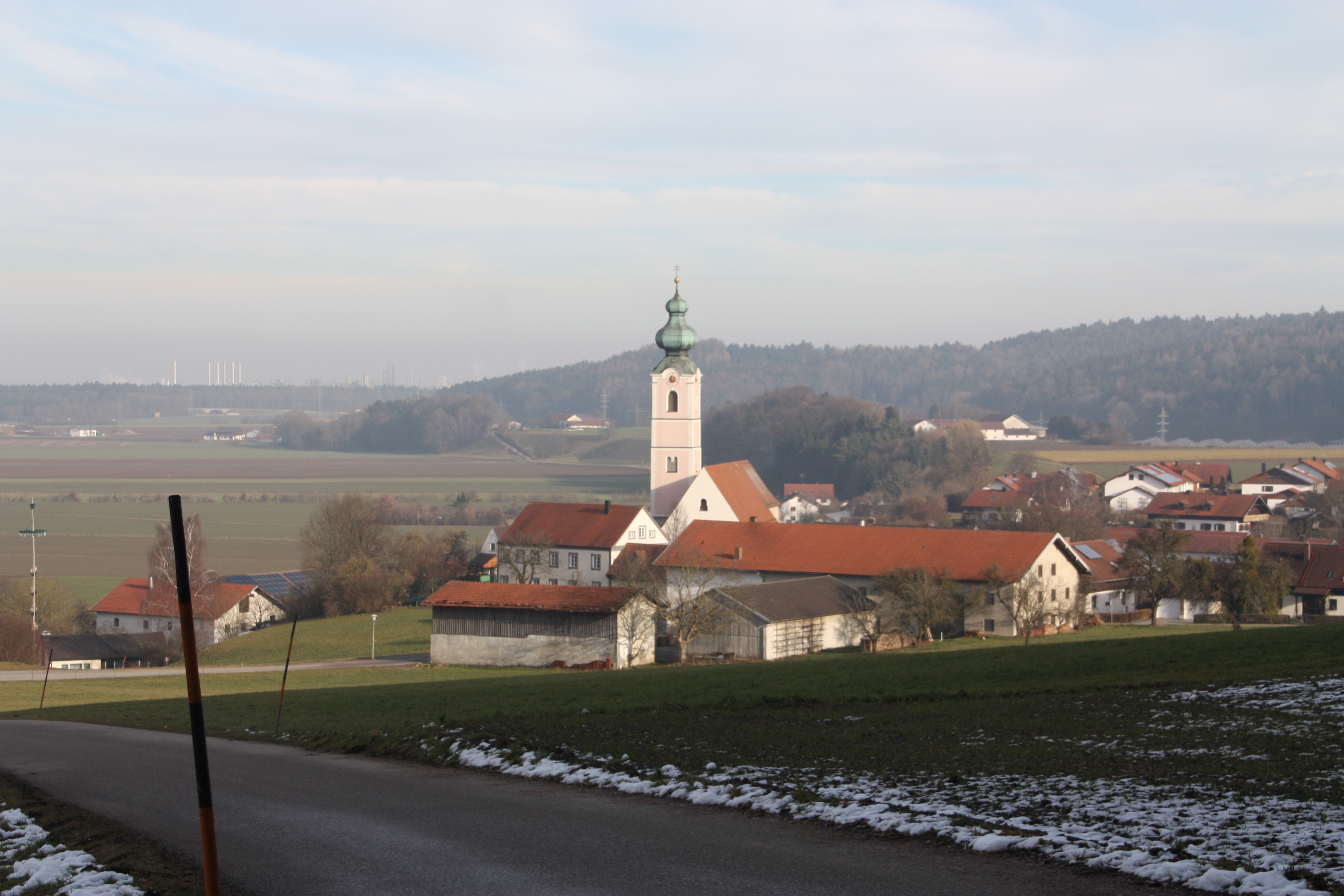 Mehring (Bavaria)